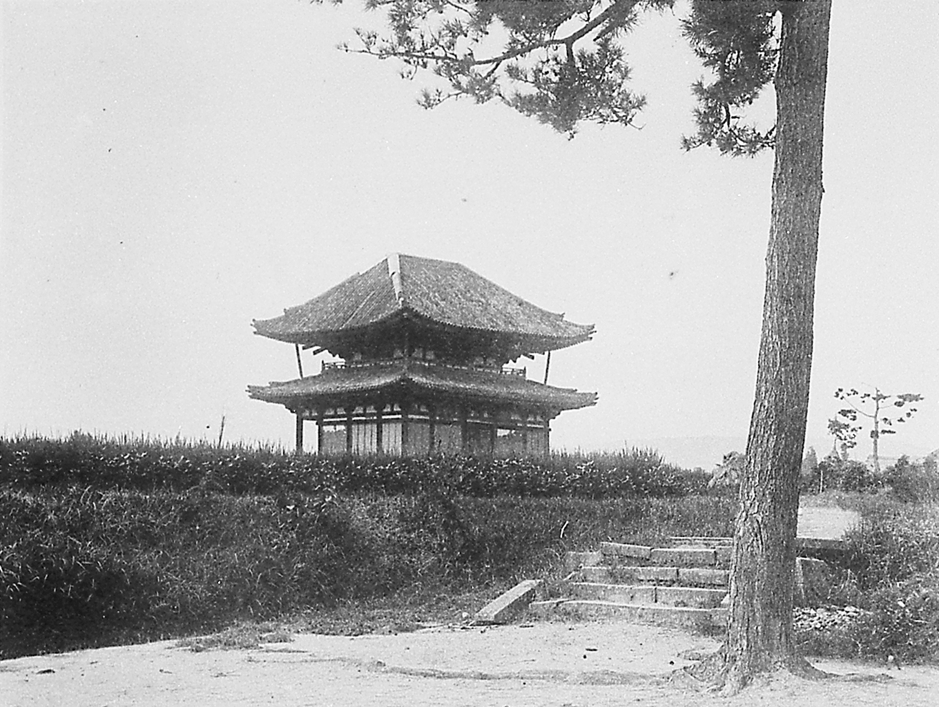 奈良県生駒郡都跡村菅原の貴光寺。明治中期の撮影。菅原寺、喜光寺とも。